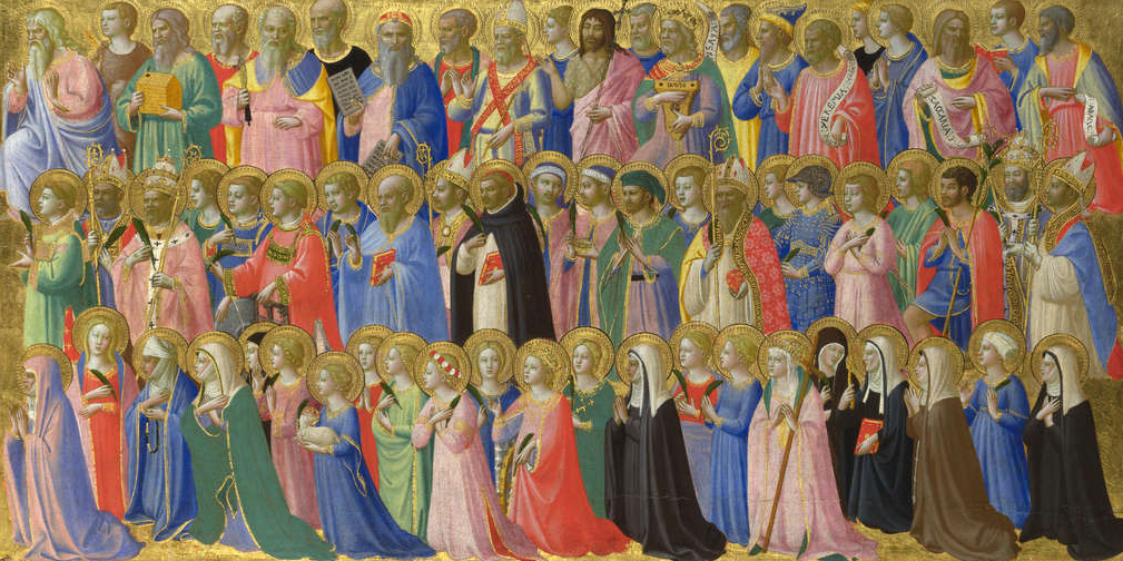 Beato angelico, predella della pala di fiesole 02.jpg